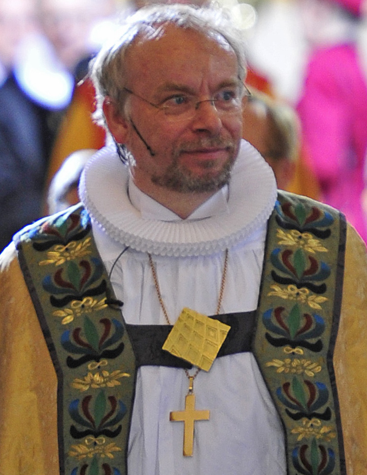 Biskop Peter Skov-Jakobsen ved bispevielse af Henning Toft Bro i Budolfi Kirke, Aalborg.